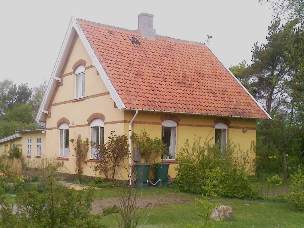 Kannikegård Station